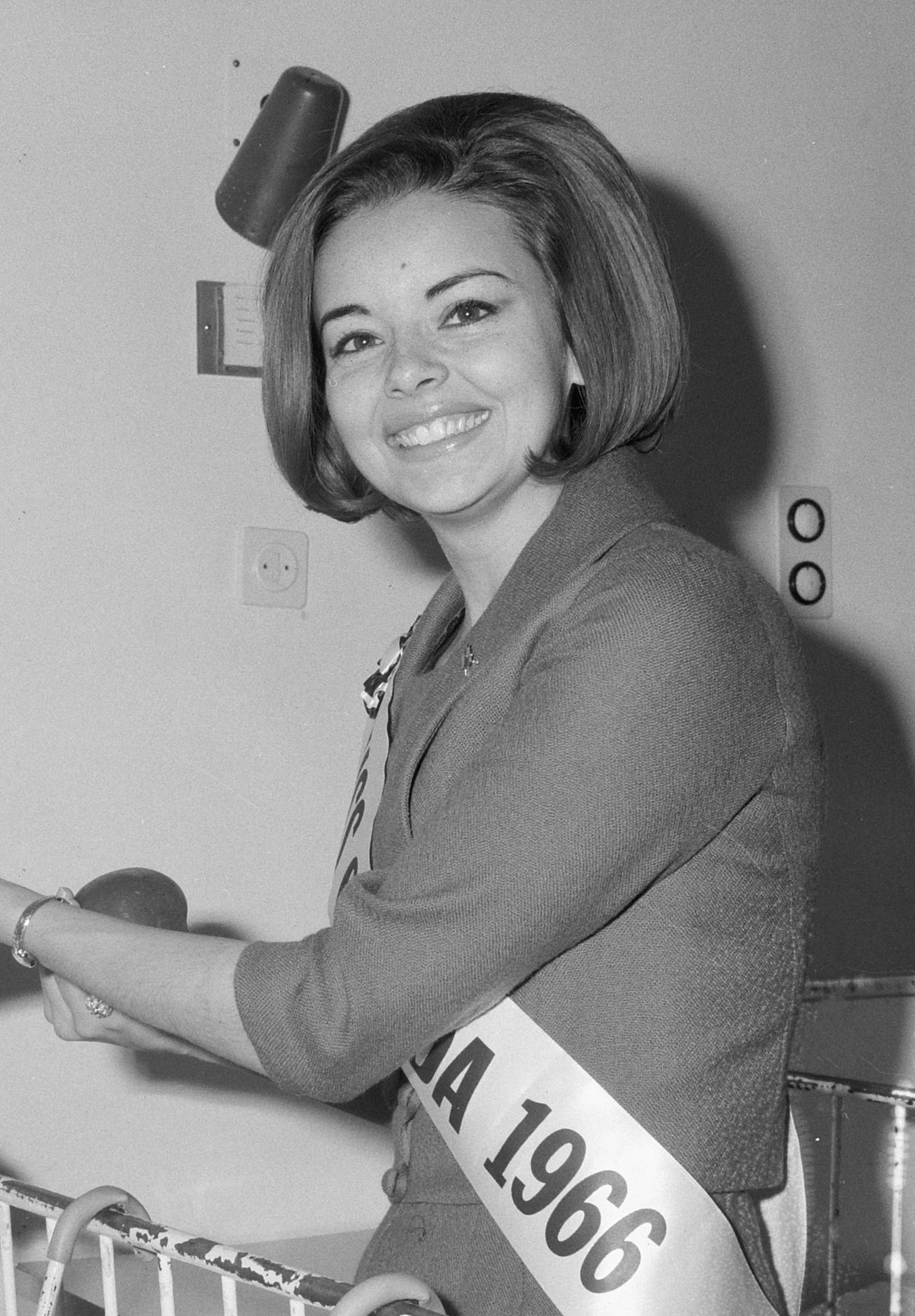 Miss Canada Diane Landry tijdens een bezoek aan het Emma kinderziekenhuis te Amsterdam